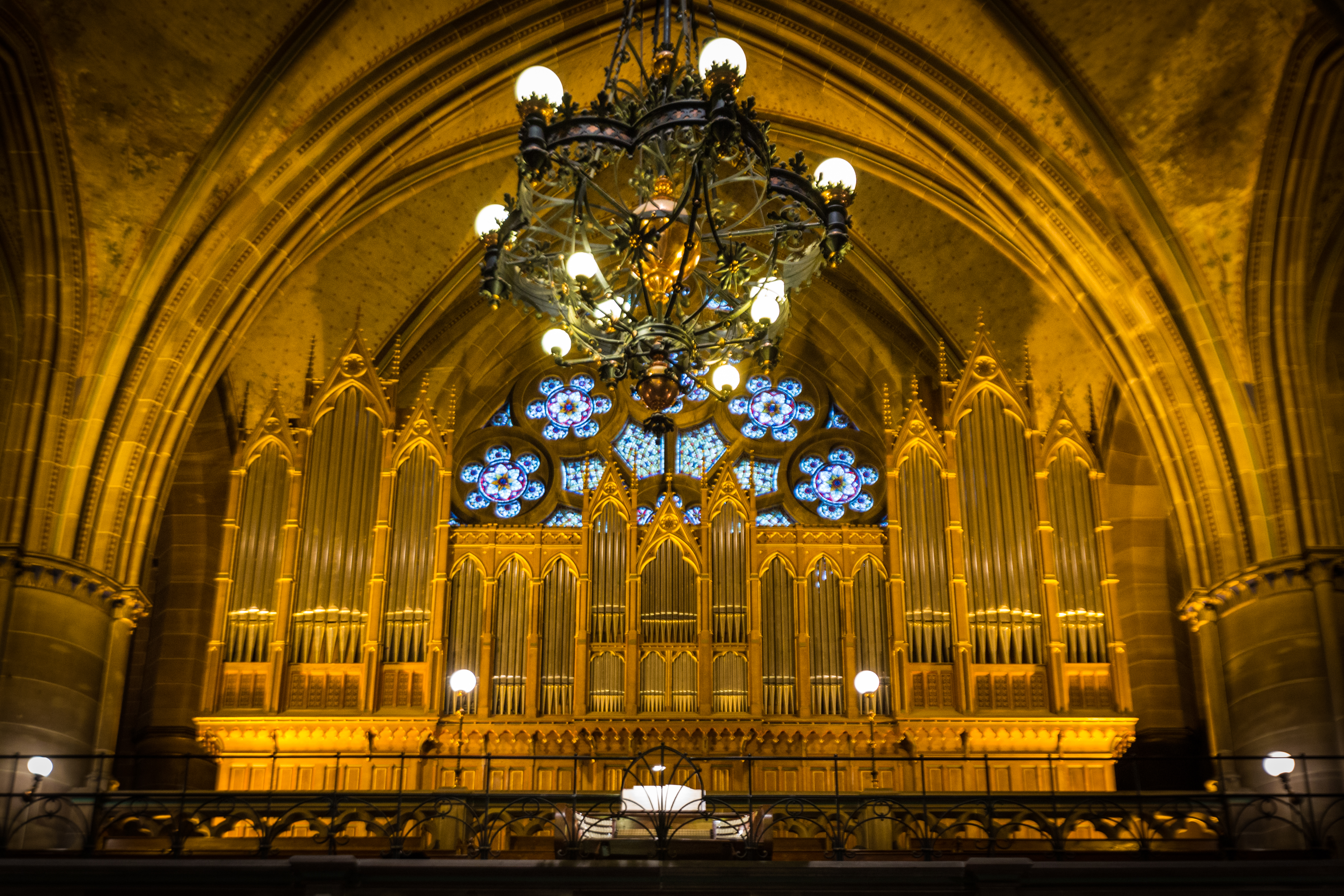 Le grand orgue de tribune, réalisé en 1897 par Eberhard Friedrich Walcker, facteur d'orgue à Ludwigsburg, d'après les plans d'Ernest Münch et de Wilhelm Sering.